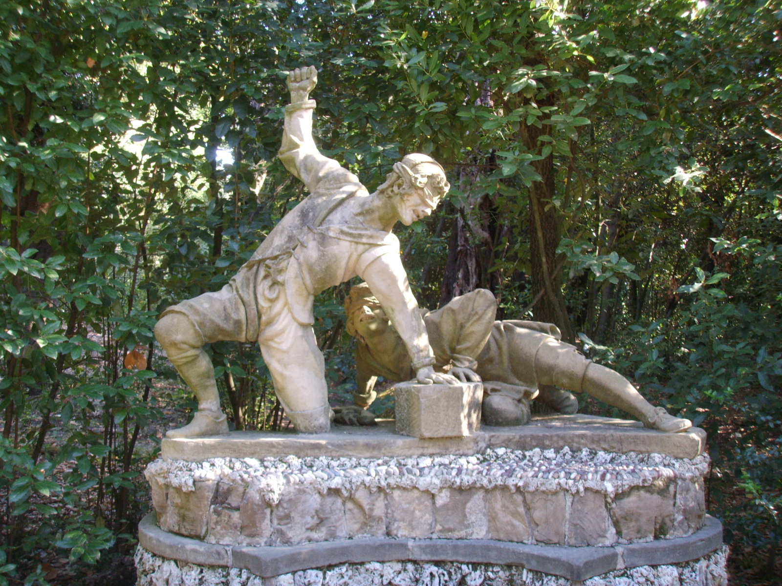 Boboli, terzo incrocio del viottolone, Orazio Mochi e Romolo del Tadda, i giocatori del saccomazzone (1780)